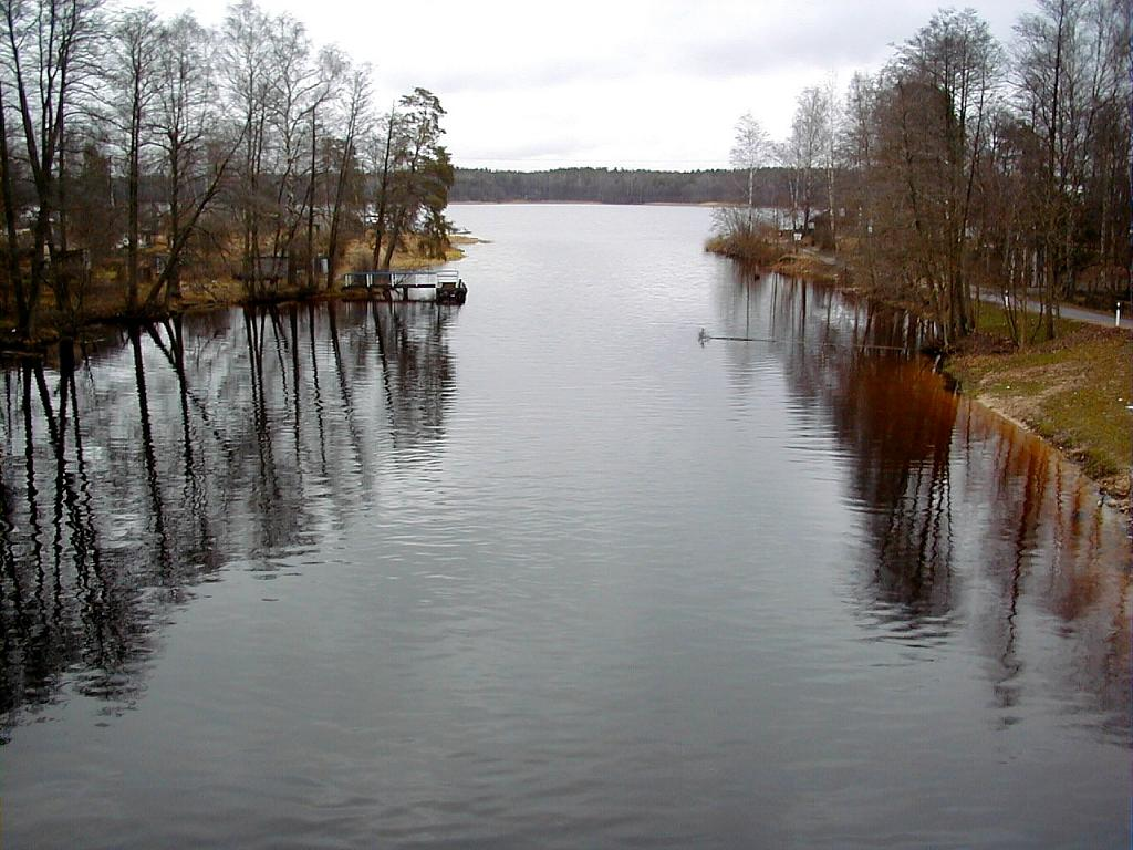 Baltezera kanāls 2000-12-17